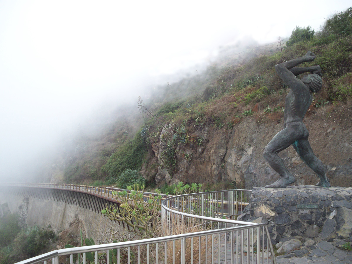 Estatua del Mencey Bentor en el mirador de El Lance, en Los Realejos. Bentor fue el último Mencey en morir a manos de las tropas castellanas. La estatua se encuentra en el mismo lugar donde se despeñó Bentor, que al igual que muchismos guanches prefirió la muerte en libertad a ser esclavizado.